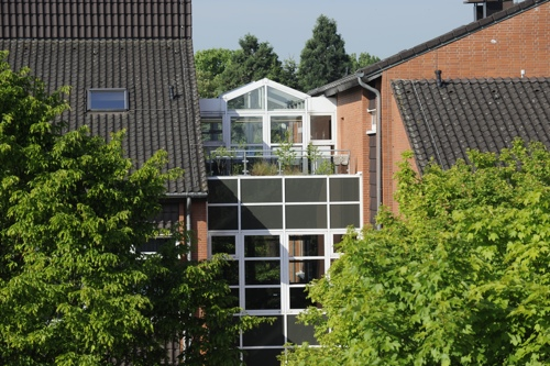 Haus 4, Bertha-von-Suttner-Gesamtschule, Dormagen